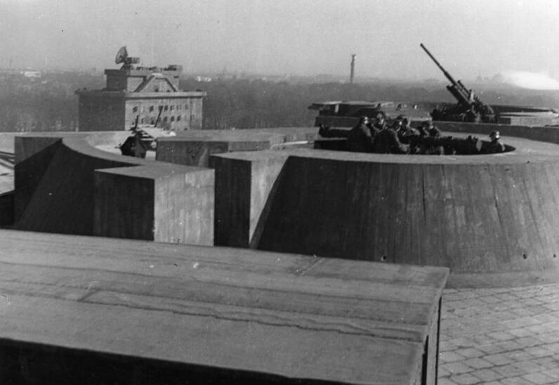 Berlin, Flak auf Zoobunker PK: Kommandogerät und schweres Geschütz auf dem Flakturm einer Großstadt. Berlin [Zoobunker] Bildberichter: Pilz 16.4.42 ADN-Bildarchiv: II. Weltkrieg 1939-45. Flugzeugabwehr auf dem Flakturm am Zoo in Berlin - Kommandogerät und schweres Flak-Geschütz während einer Übung am 16.4.1942.